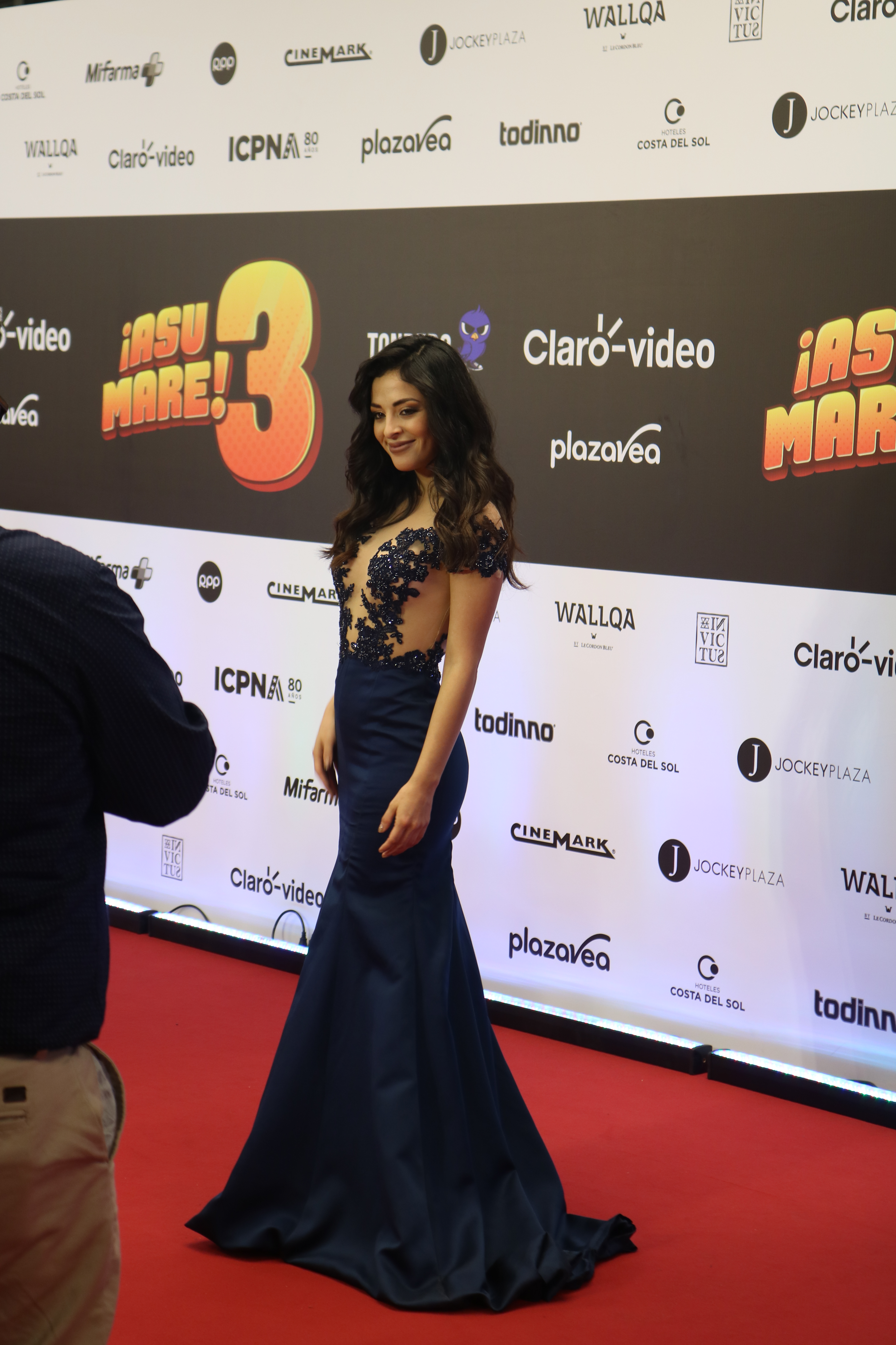 Andrea Luna en la alfombra roja de Asu Mare 3.